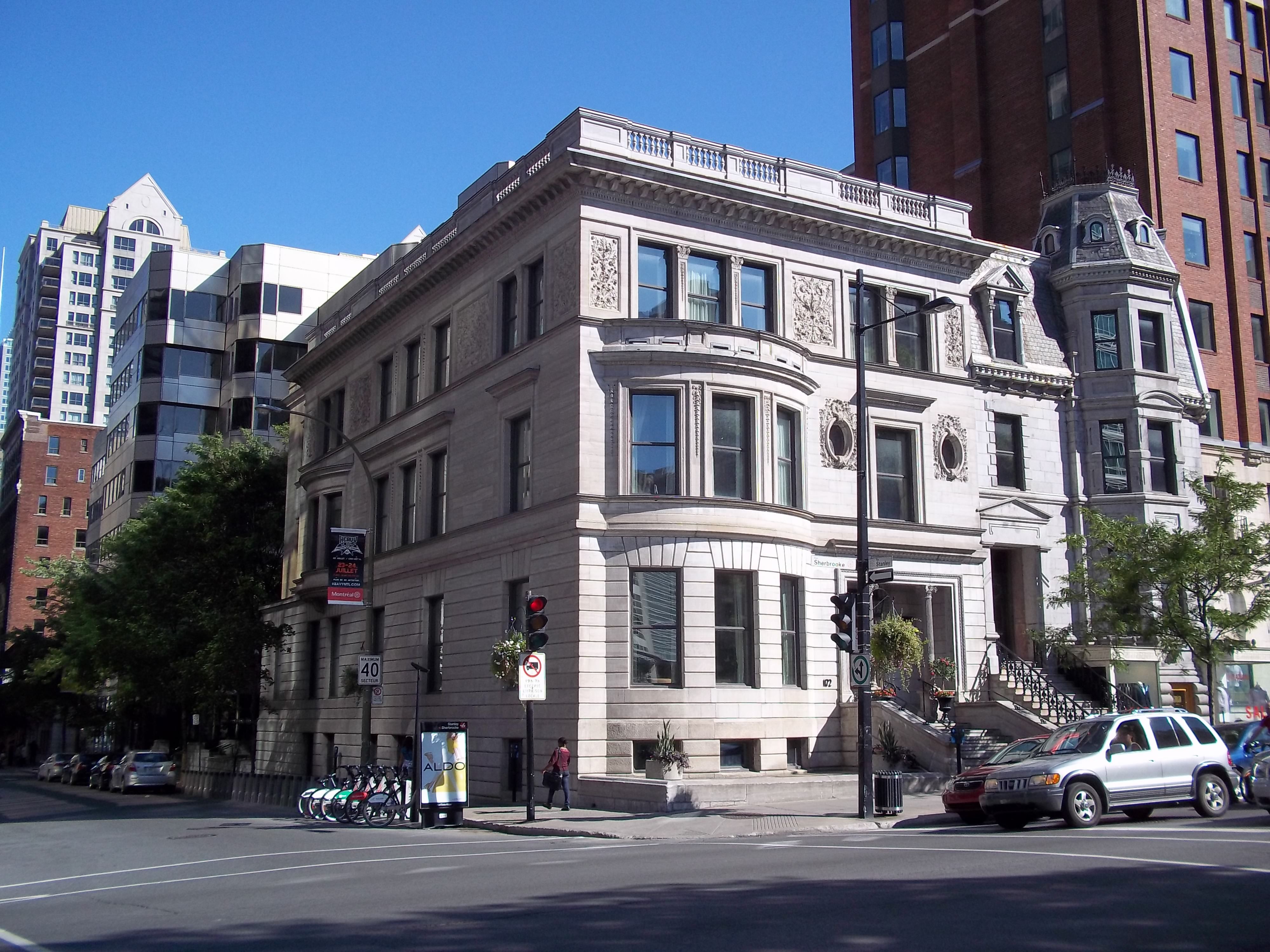 Maison Lord-Atholstan, 1172, rue Sherbrooke ouest, Montréal